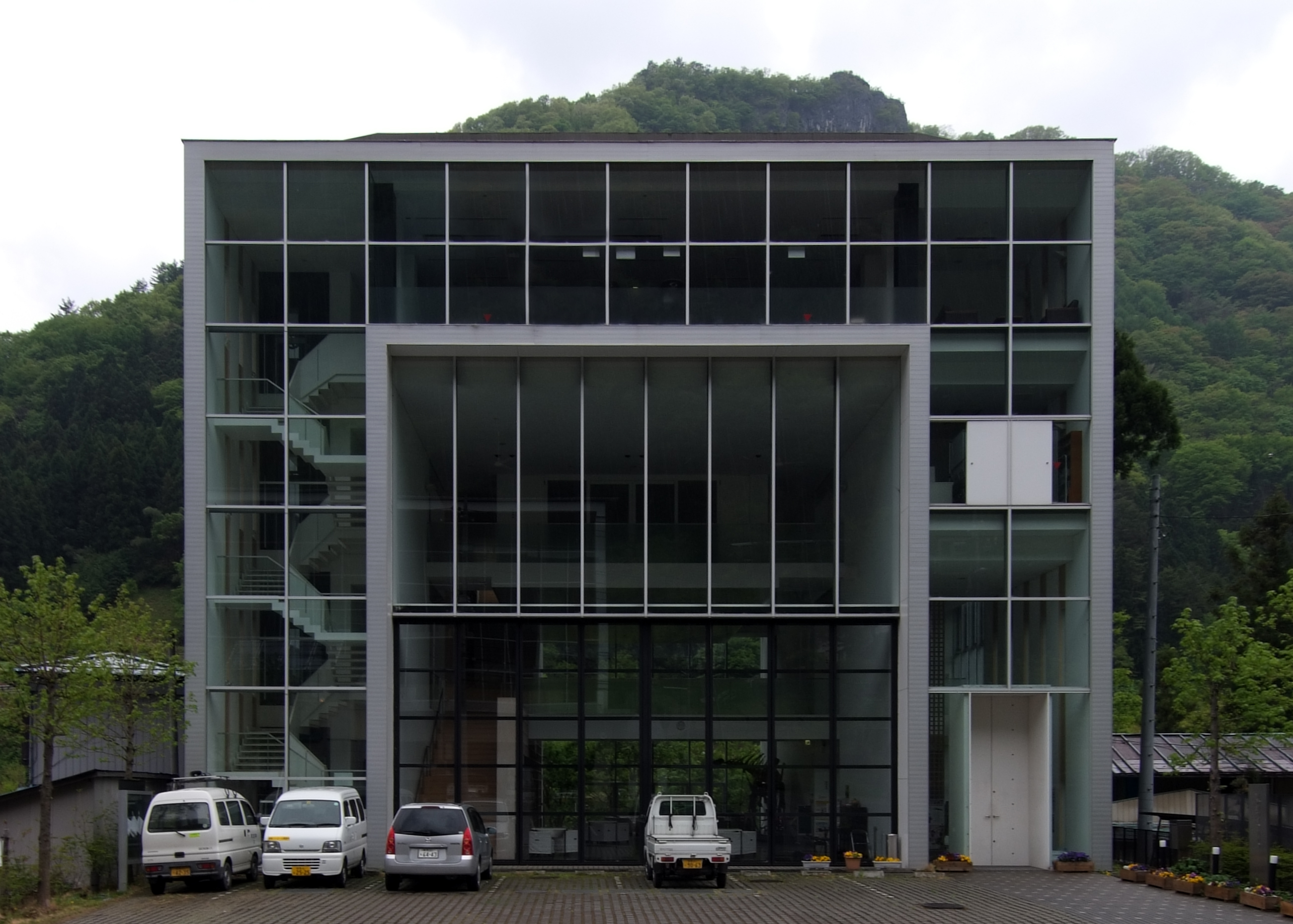 Kanna Nakasato Town Hall, at Kanna Tano-gun Gunma Japan, designed by Nobuaki Furuya Lab. + NASCA in 2003.